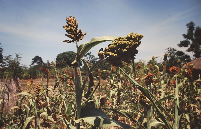 Sorghum field, Ukerewe island, Tanzania